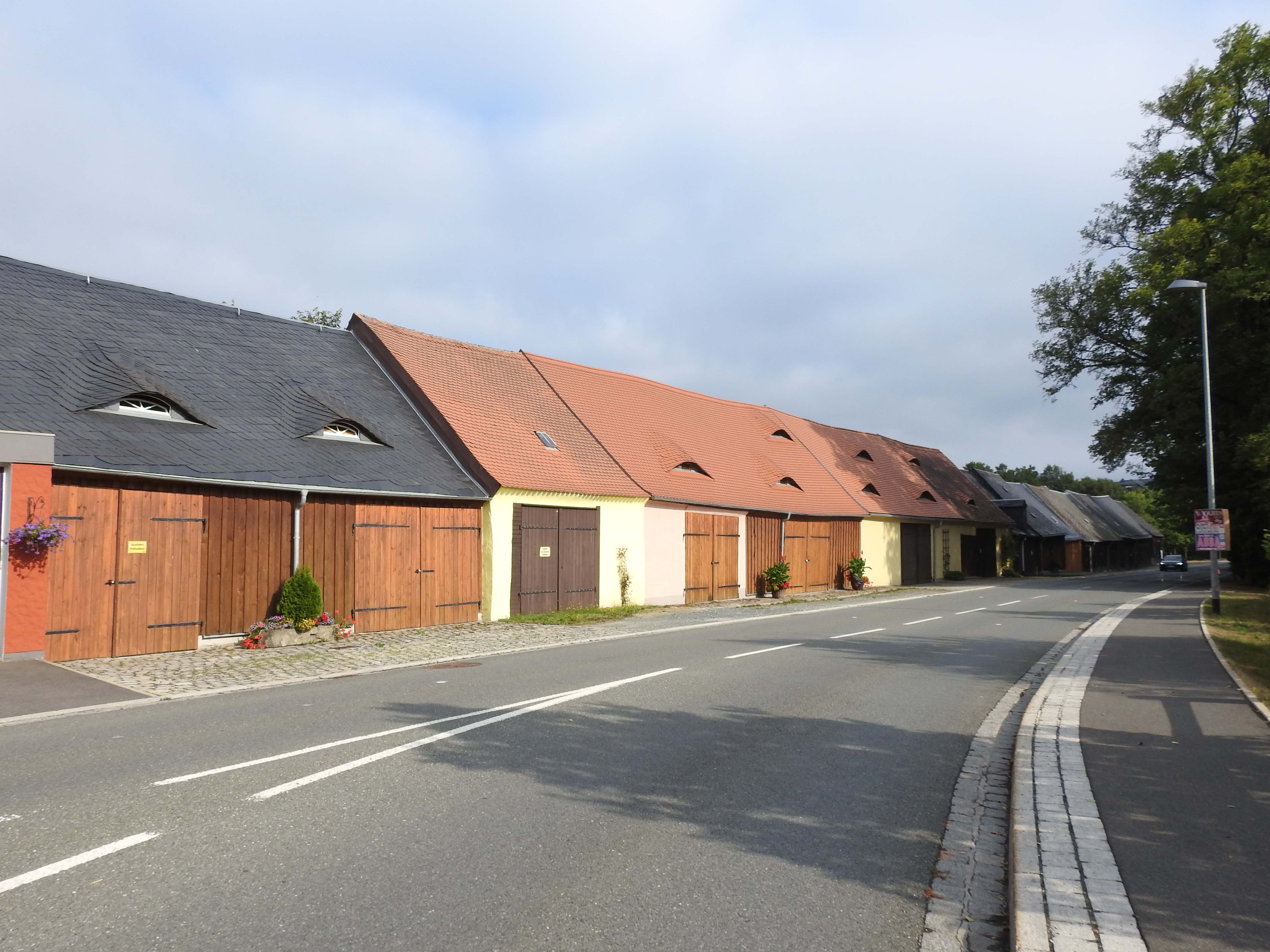 Stadelreihe Bayreuther Straße in Weißenstadt